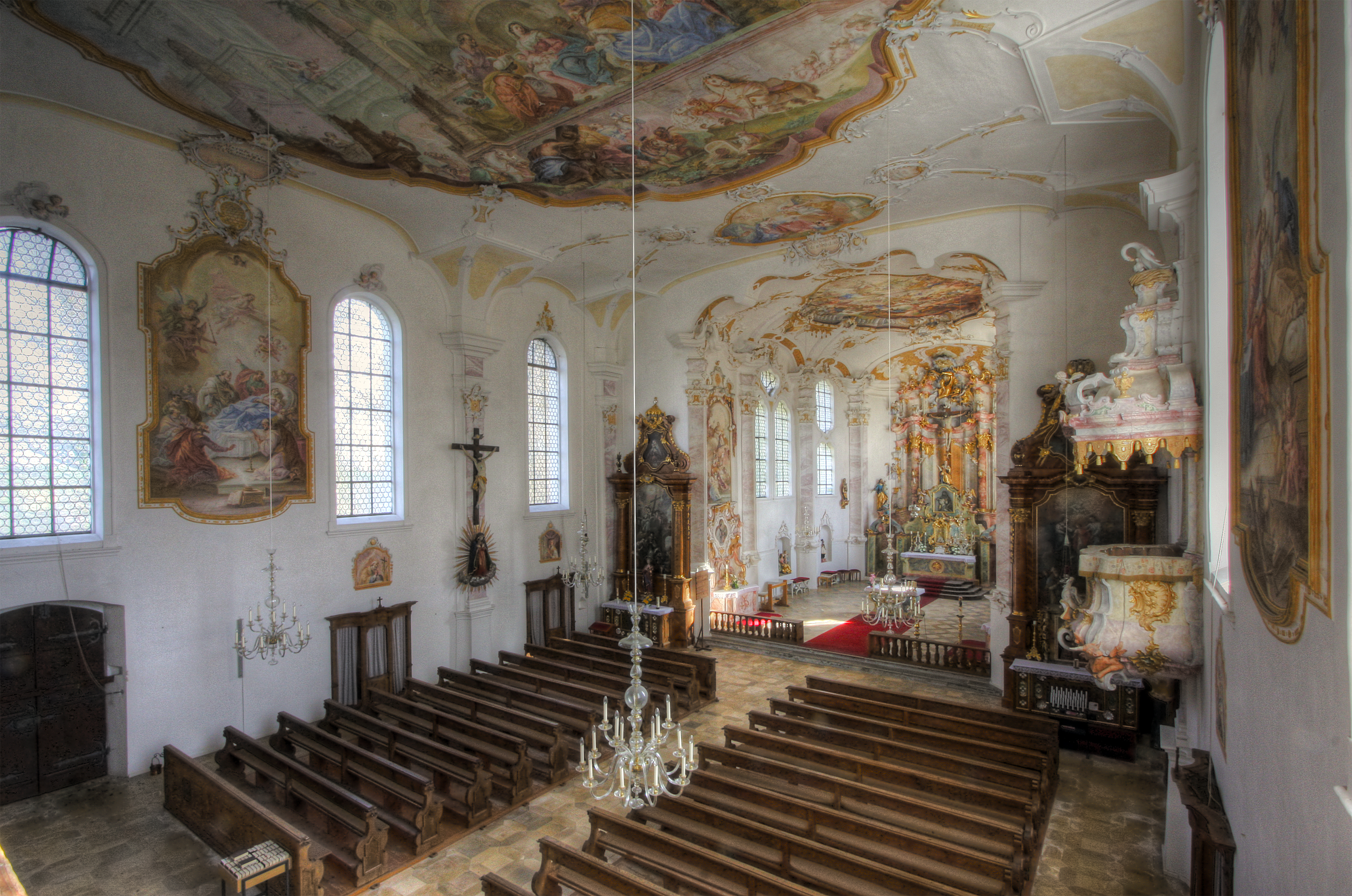 Wallfahrtskirche Allerheiligen in Jettingen-Scheppach, Gesamtansicht auf Langhaus, Chor und Altar